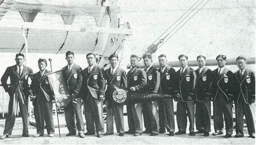 明大柔道部 第1回明治神宮体育大会柔道大会優勝メンバー